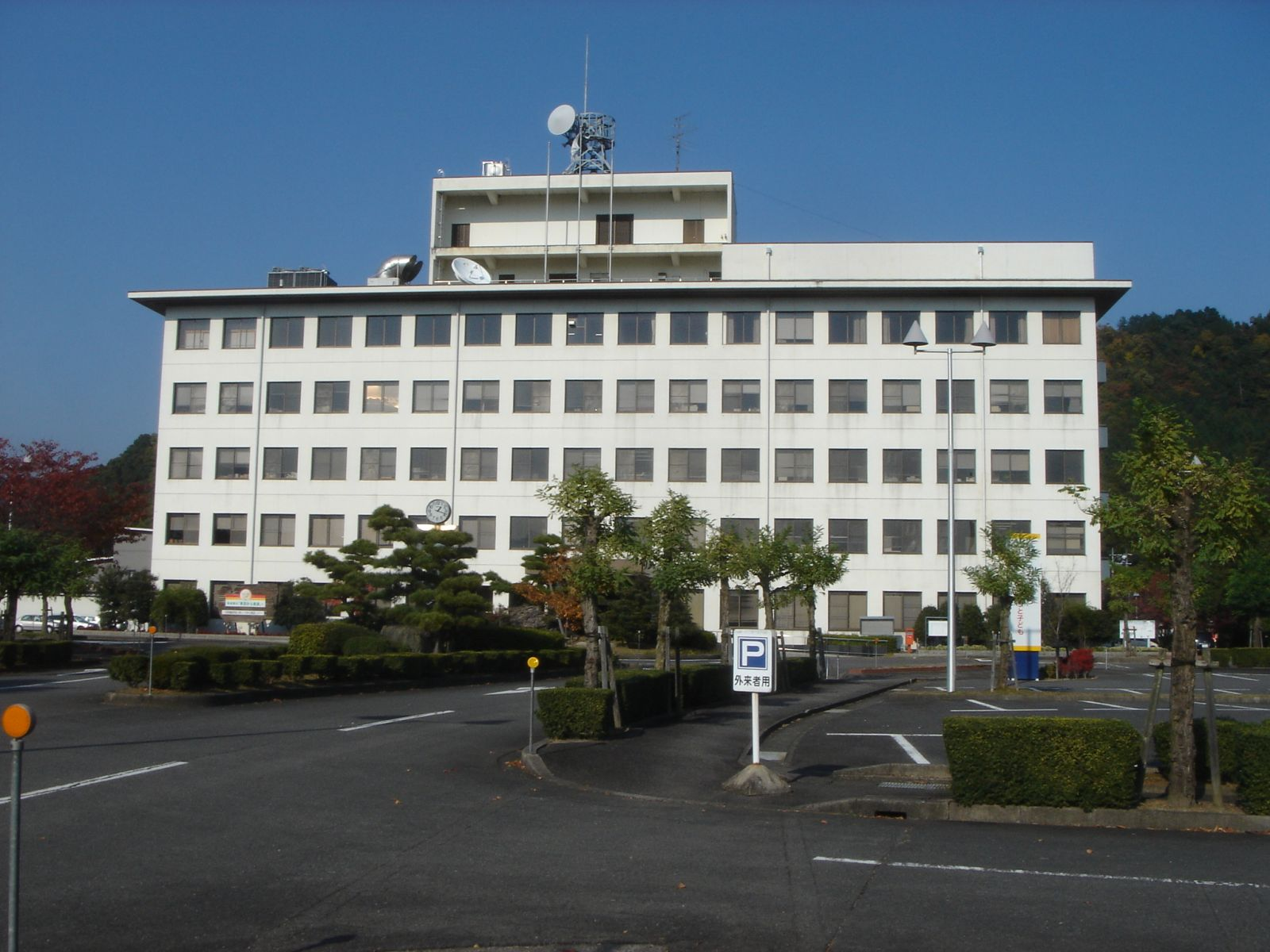 （揖斐総合庁舎）,Ibigawa,Gifu,Japan(岐阜県揖斐川町)で撮影。